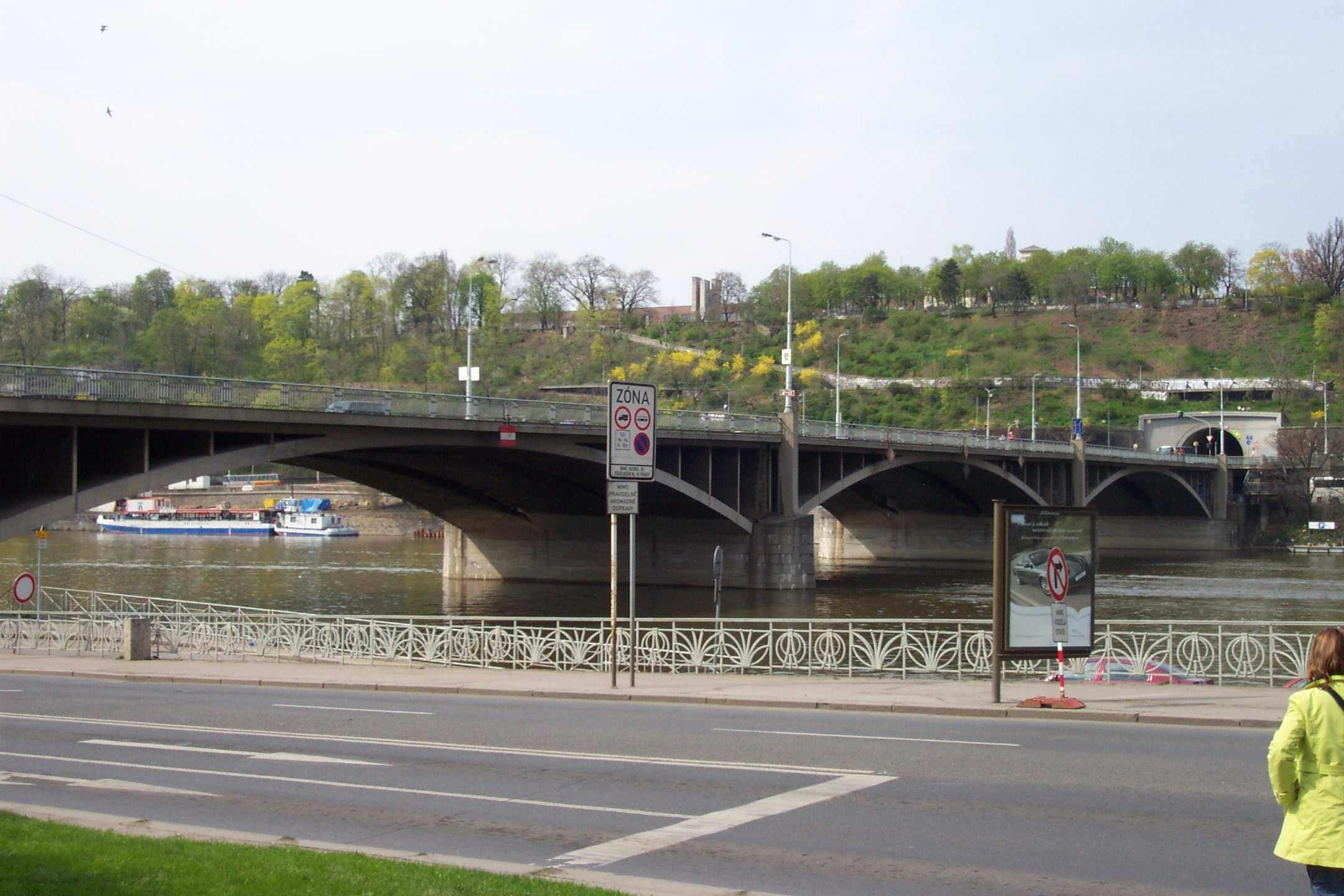 Štefánikův most (bridge)